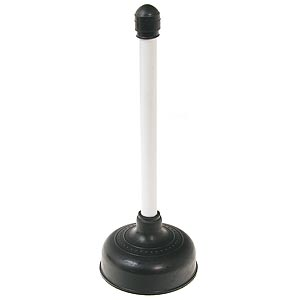 eine Saugglocke